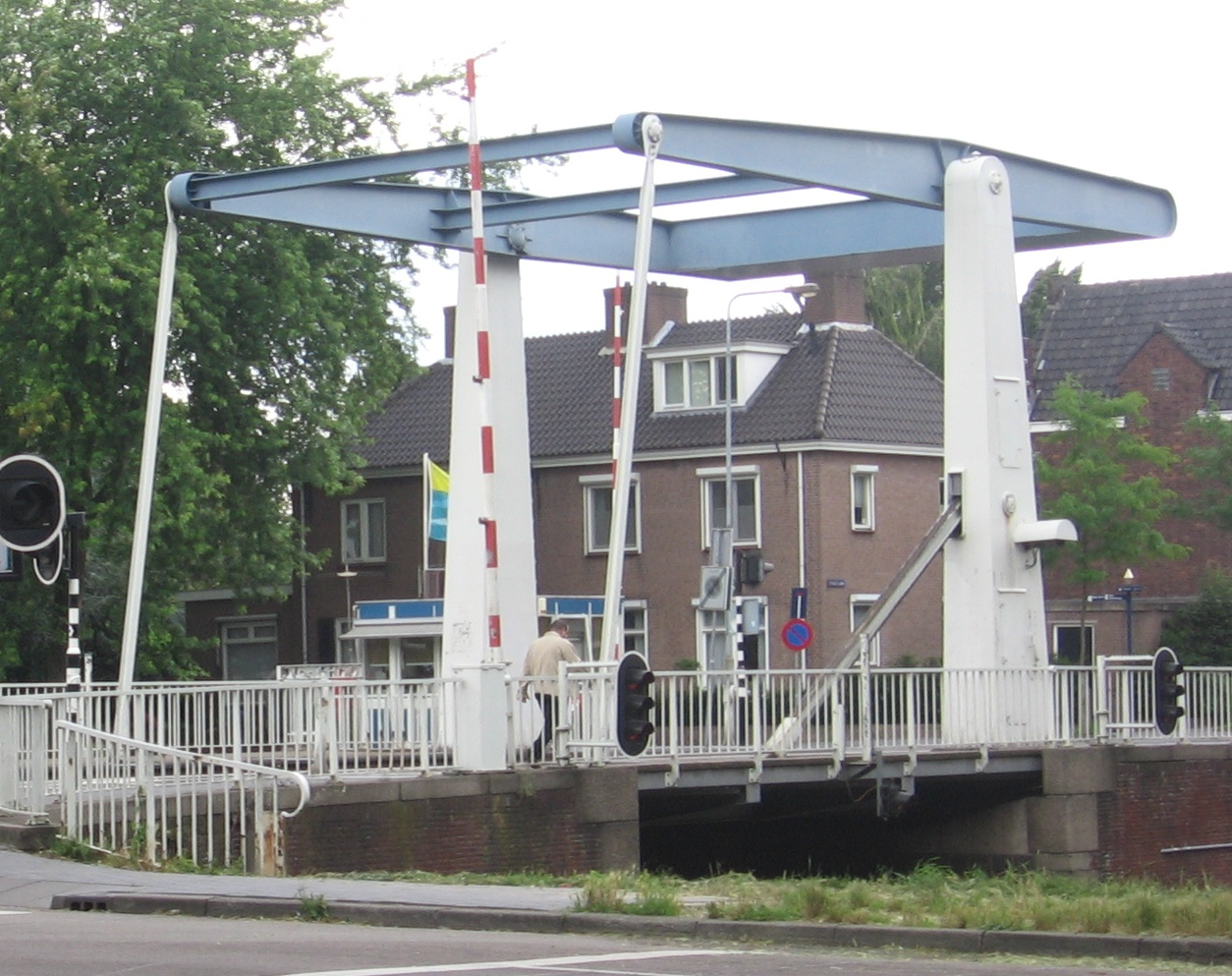 Orthenbrug in 's-Hertogenbosch, the Netherlands